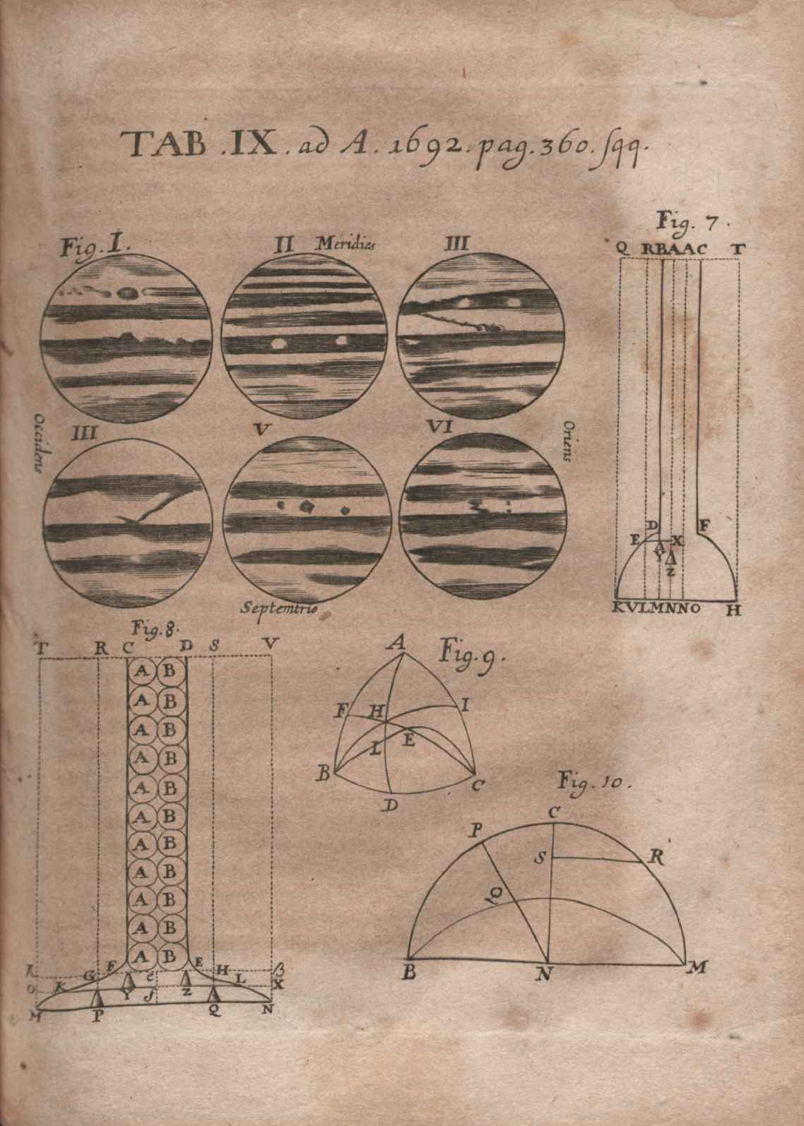 Illustration